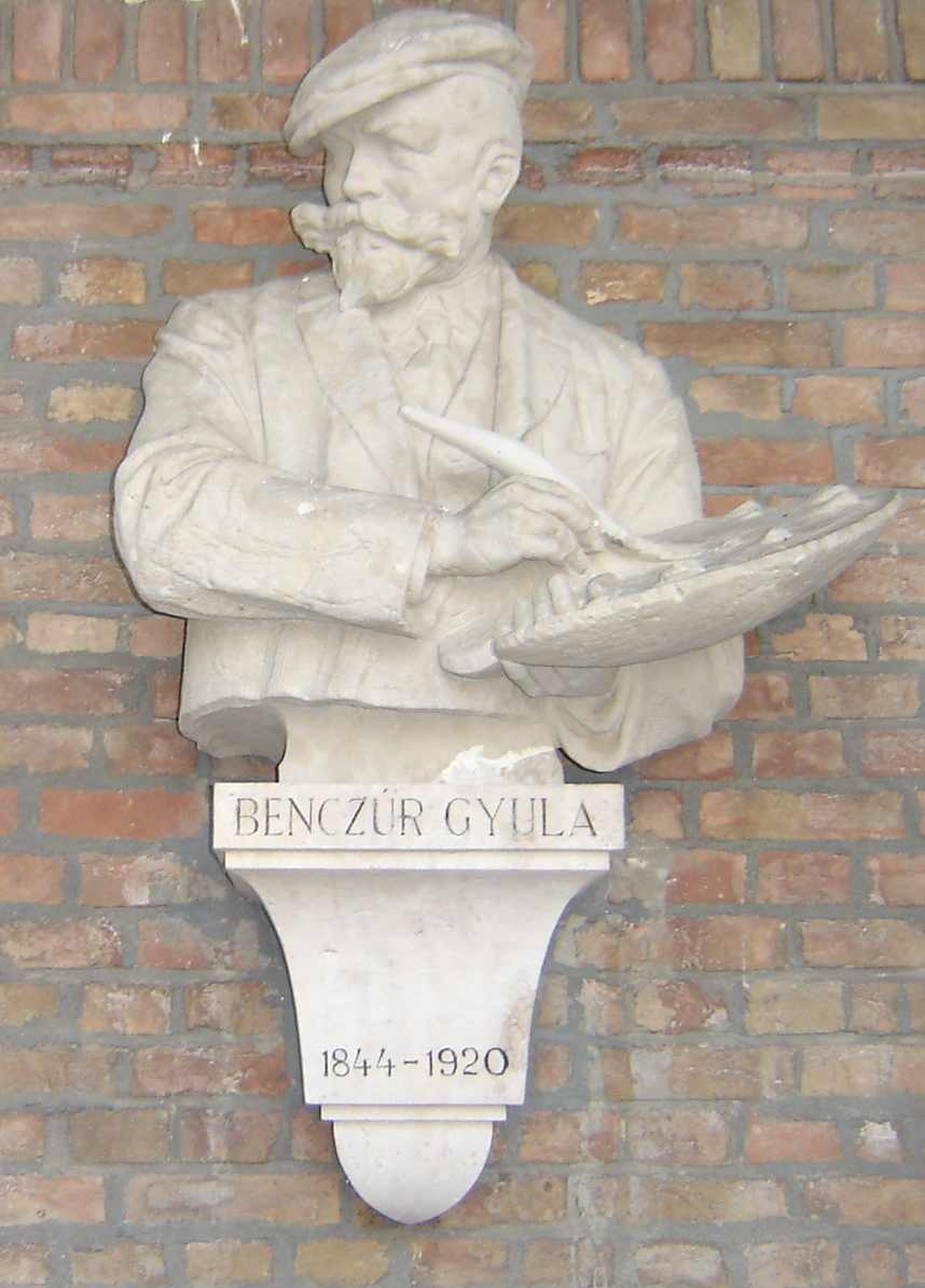 Benczúr Gyula (1844-1920) festőművész szobra a szegedi Nemzeti Emlékcsarnokban a Dóm tér nyugati oldalán az árkádok alatt. Kisfaludi Strobl Zsigmond alkotása